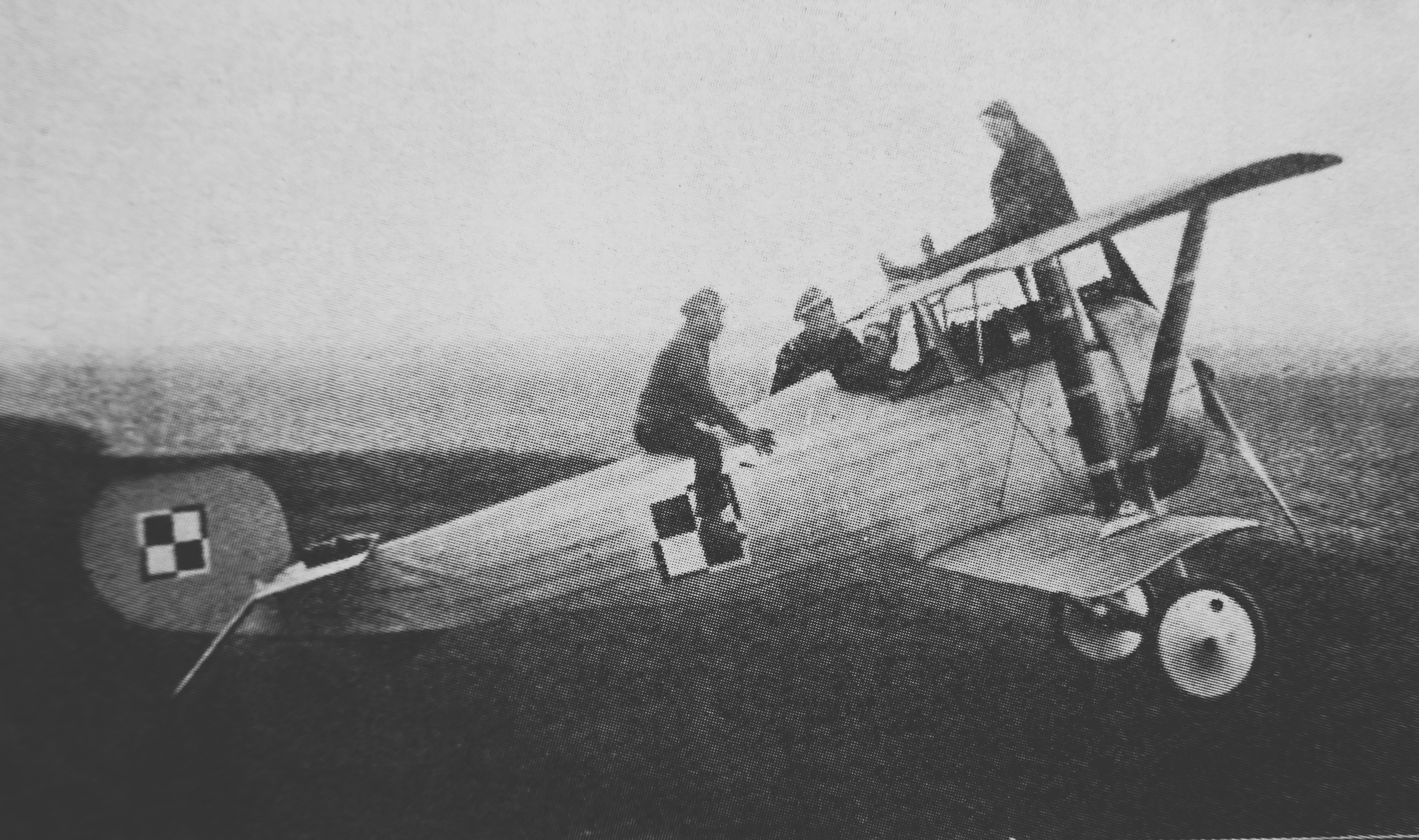 5 eskadra wywiadowcza - samolot "Nieuport" por. Juljusza Gilewicza